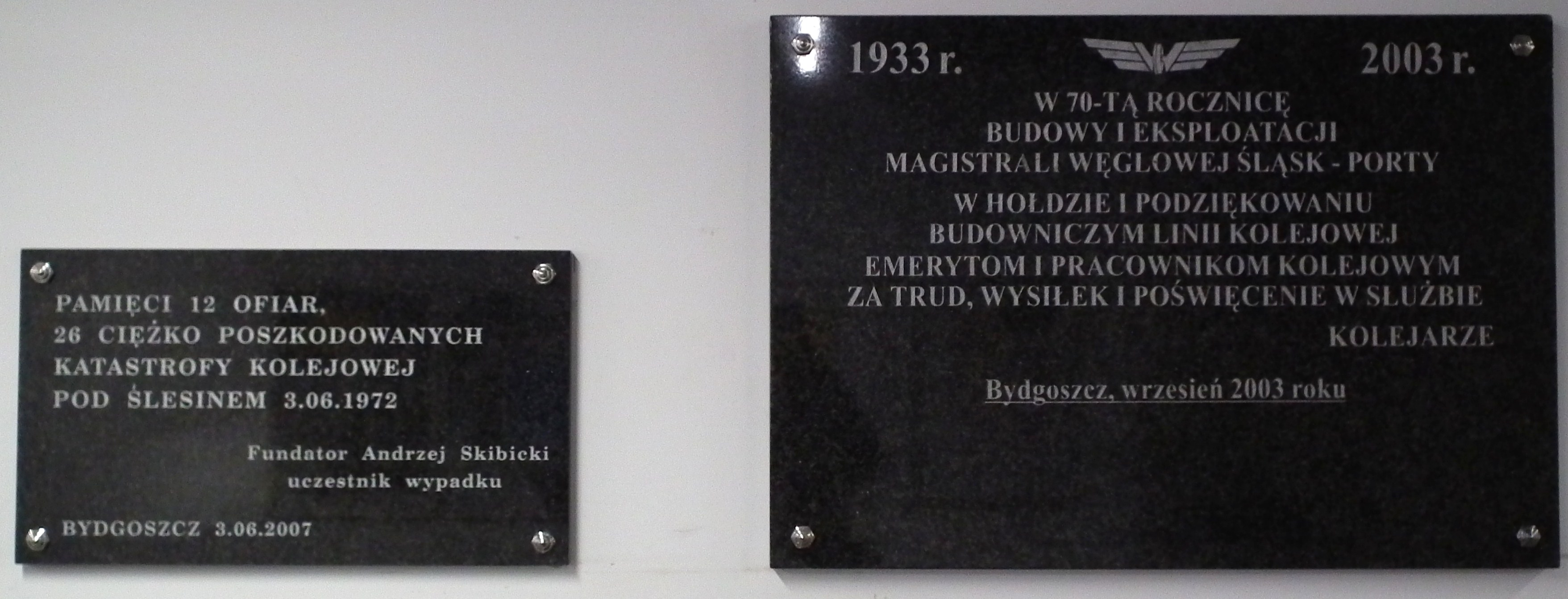 Dworzec Bydgoszcz Gł.